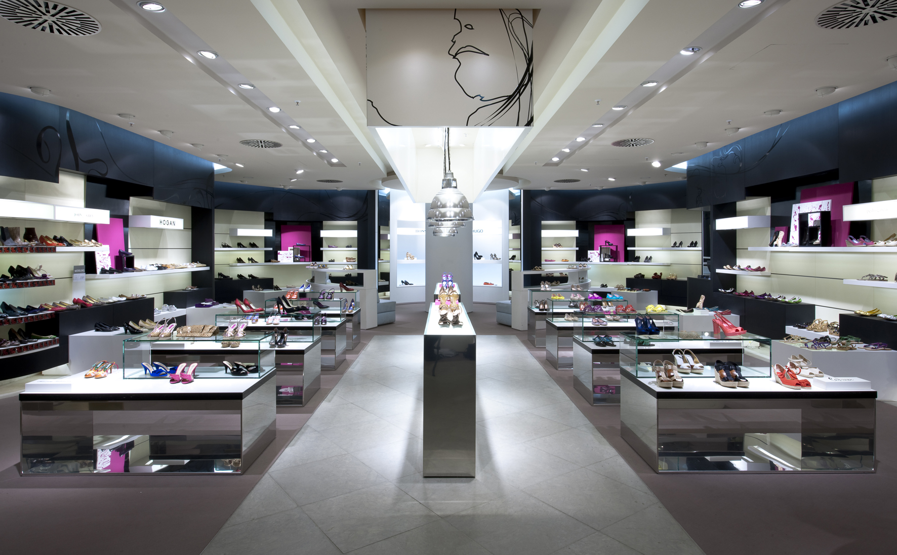 Breuninger Schuhfloor